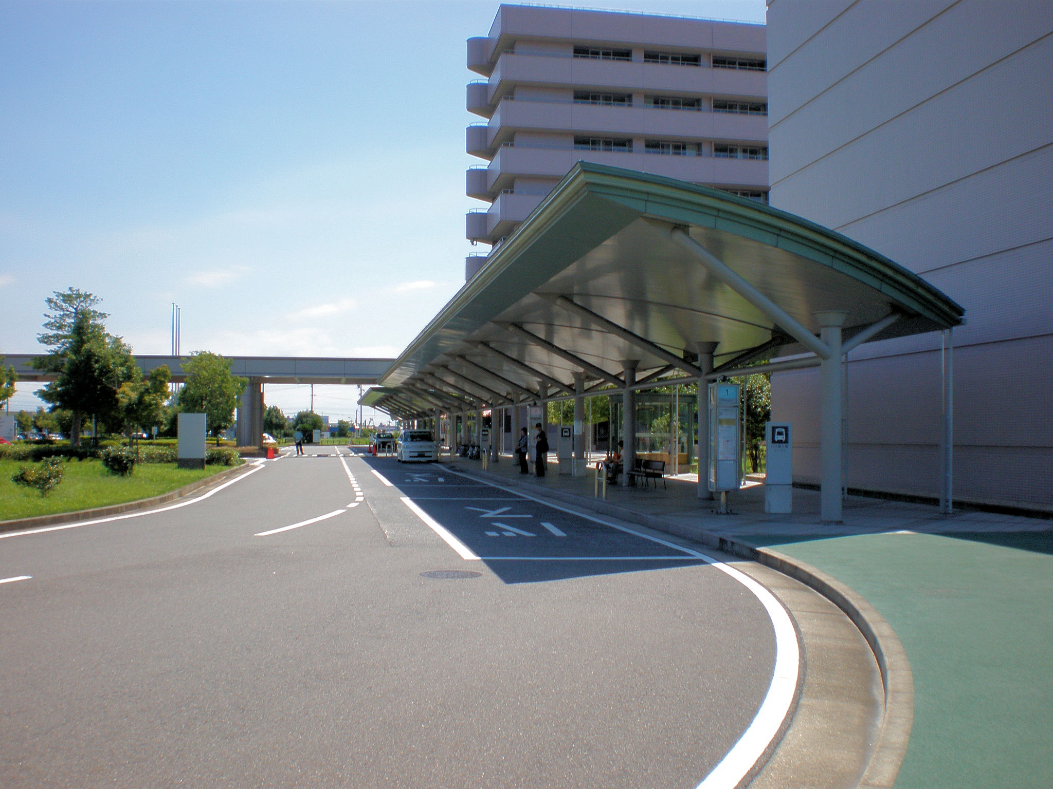 愛知県春日井市の春日井市民病院前にある春日井市民病院停留所